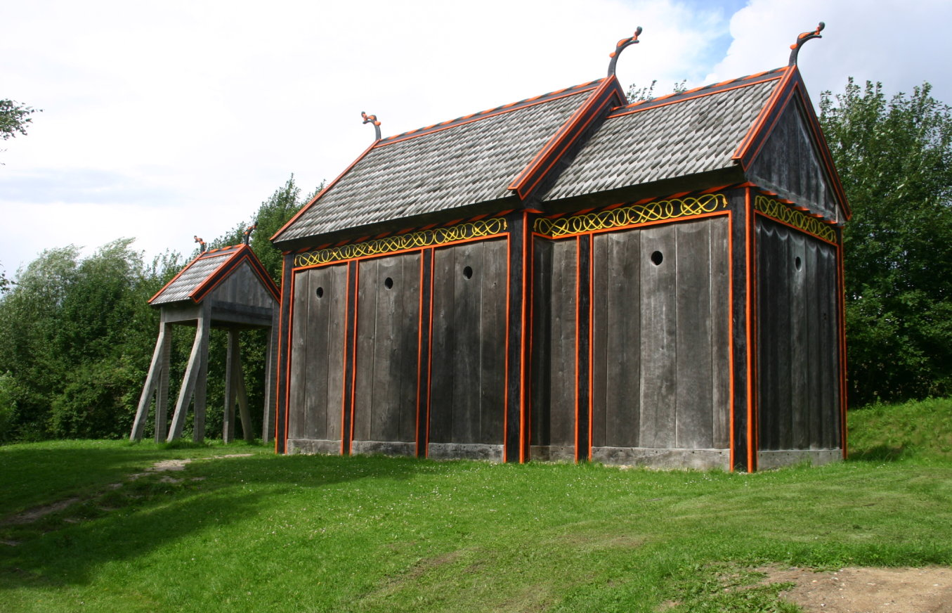 Hørning Church Hørning Sogn (Sønderhald Kommune) : Recontruction at Moesgaard Museum, Aarhus, Denmark